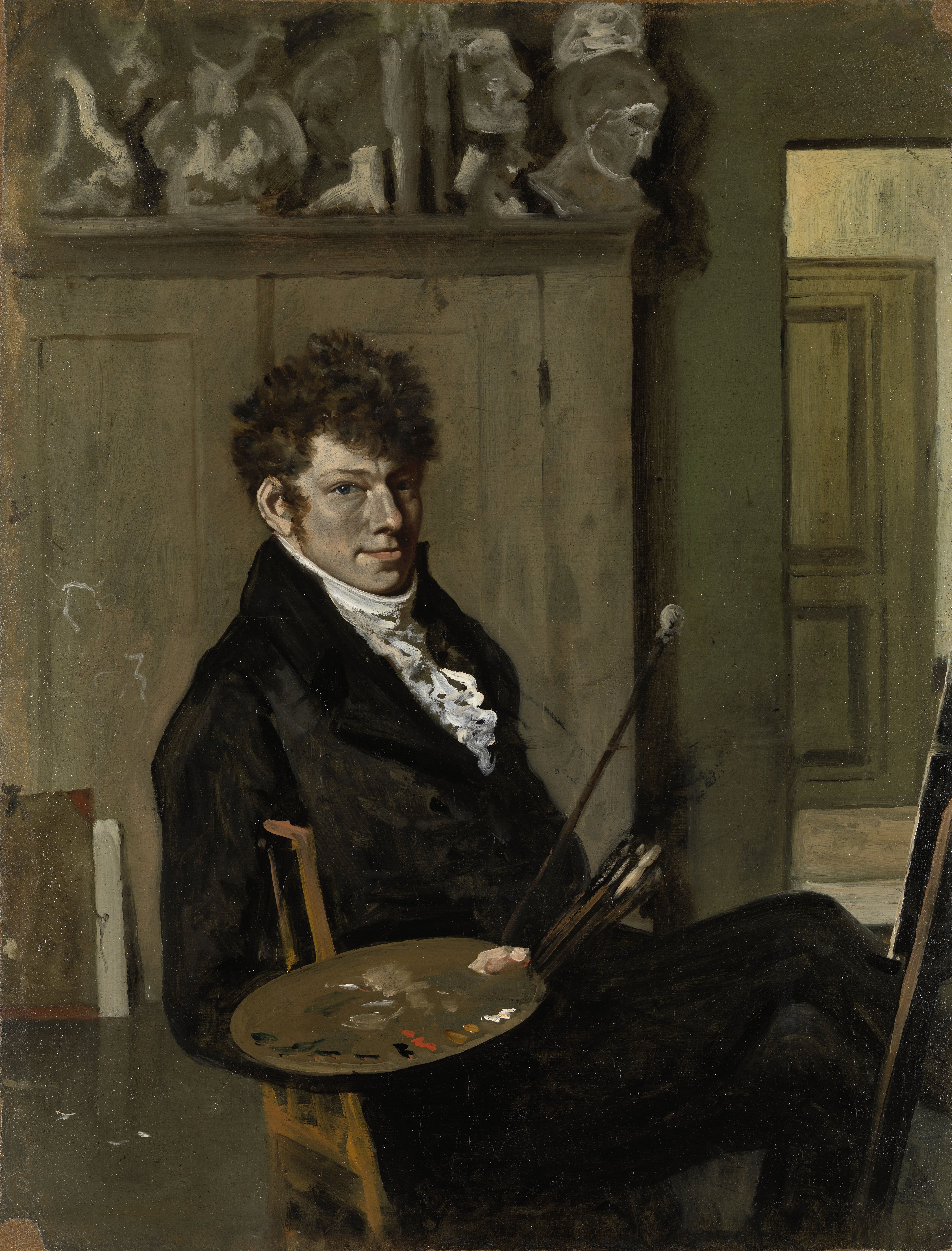 Zelfportret van Wouter Johannes van Troostwijk, zittend in zijn atelier achter een schilderij met palet, penselen en schildersstok in de hand. Bovenop een kast liggen verschillende gipsmodellen.; Wouter Johannes van Troostwijk (1782-1810), olieverf op papier op karton op paneel, ca. 1809